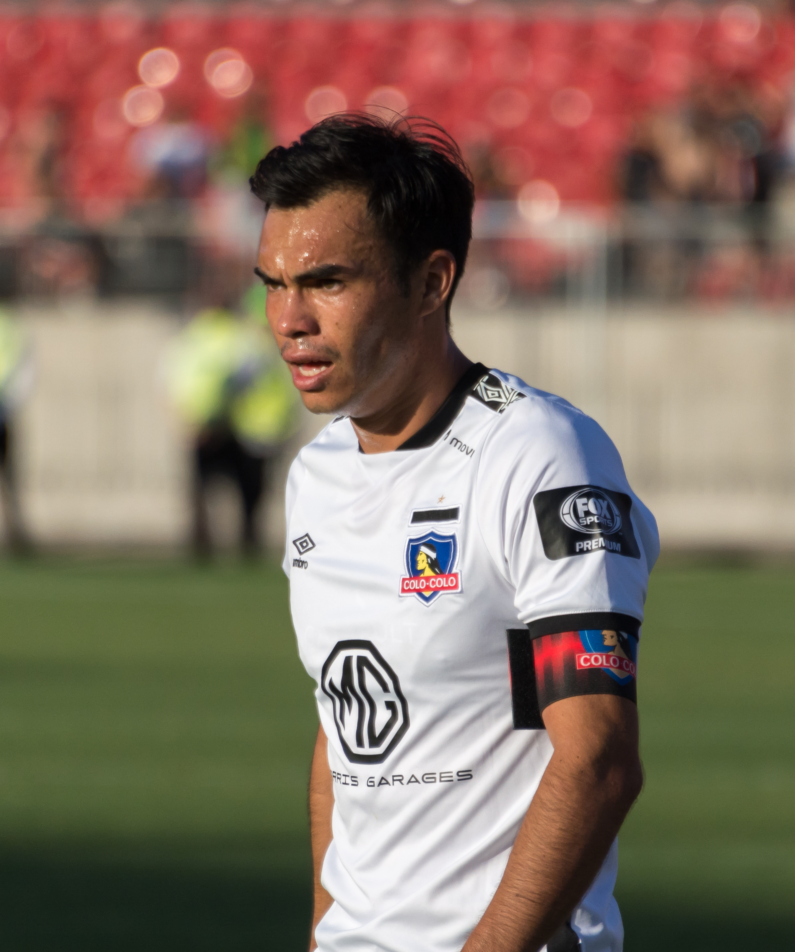 Audax Italiano v Colo-Colo, Estadio Nacional, Ñuñoa, Santiago, Región Metropolitana, Chile